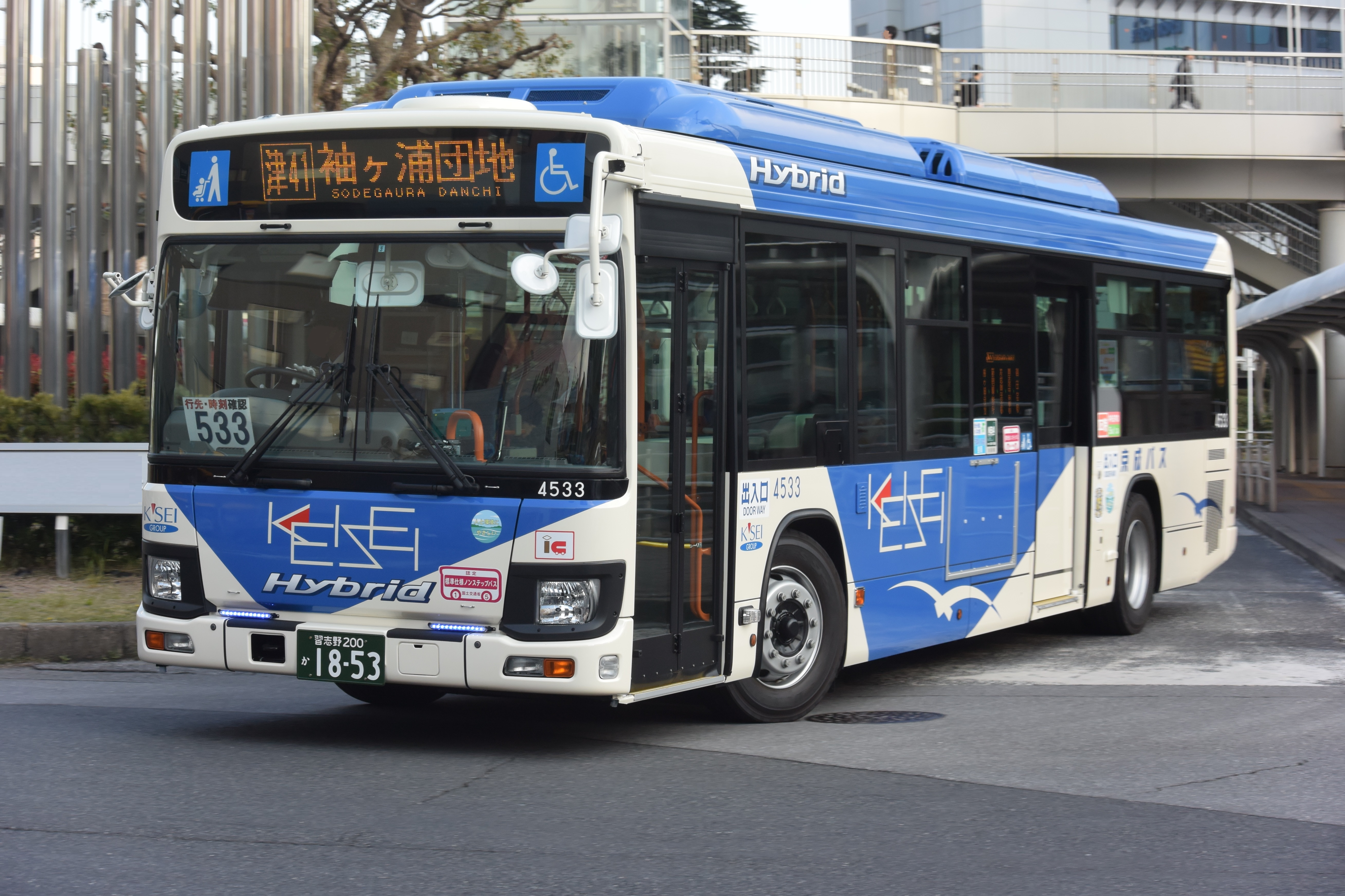 日野ブルーリボンハイブリッド QSG-HL2ASAP 京成バス 新都心営業所 4533号車